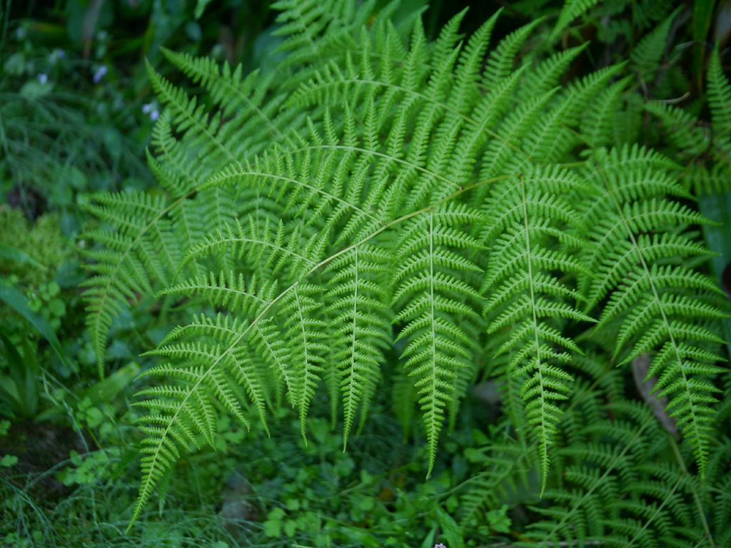 Thelypteris torresiana var. clavata：ヒメワラビ 2015/10/12 和歌山県田辺市：Tanabe City. Wakayama Pref. Japan